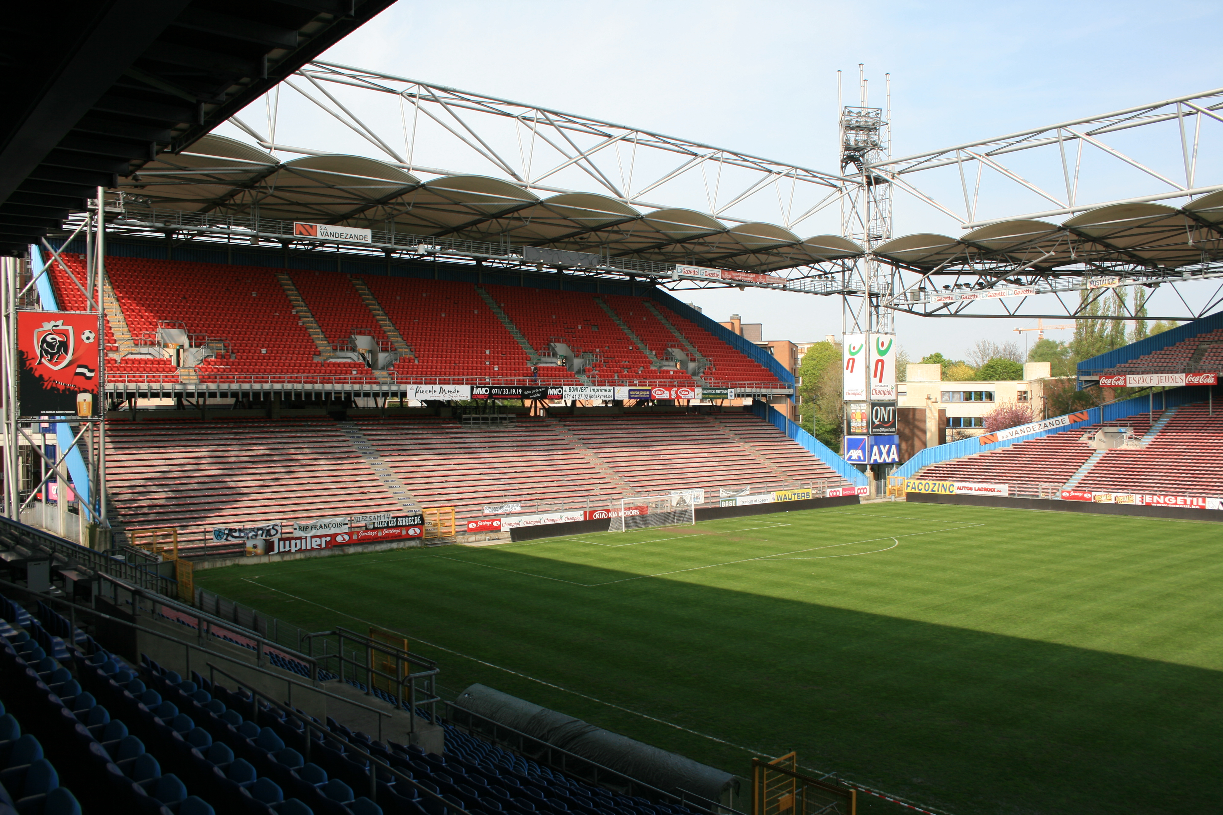 Stade de l'Euro 2000